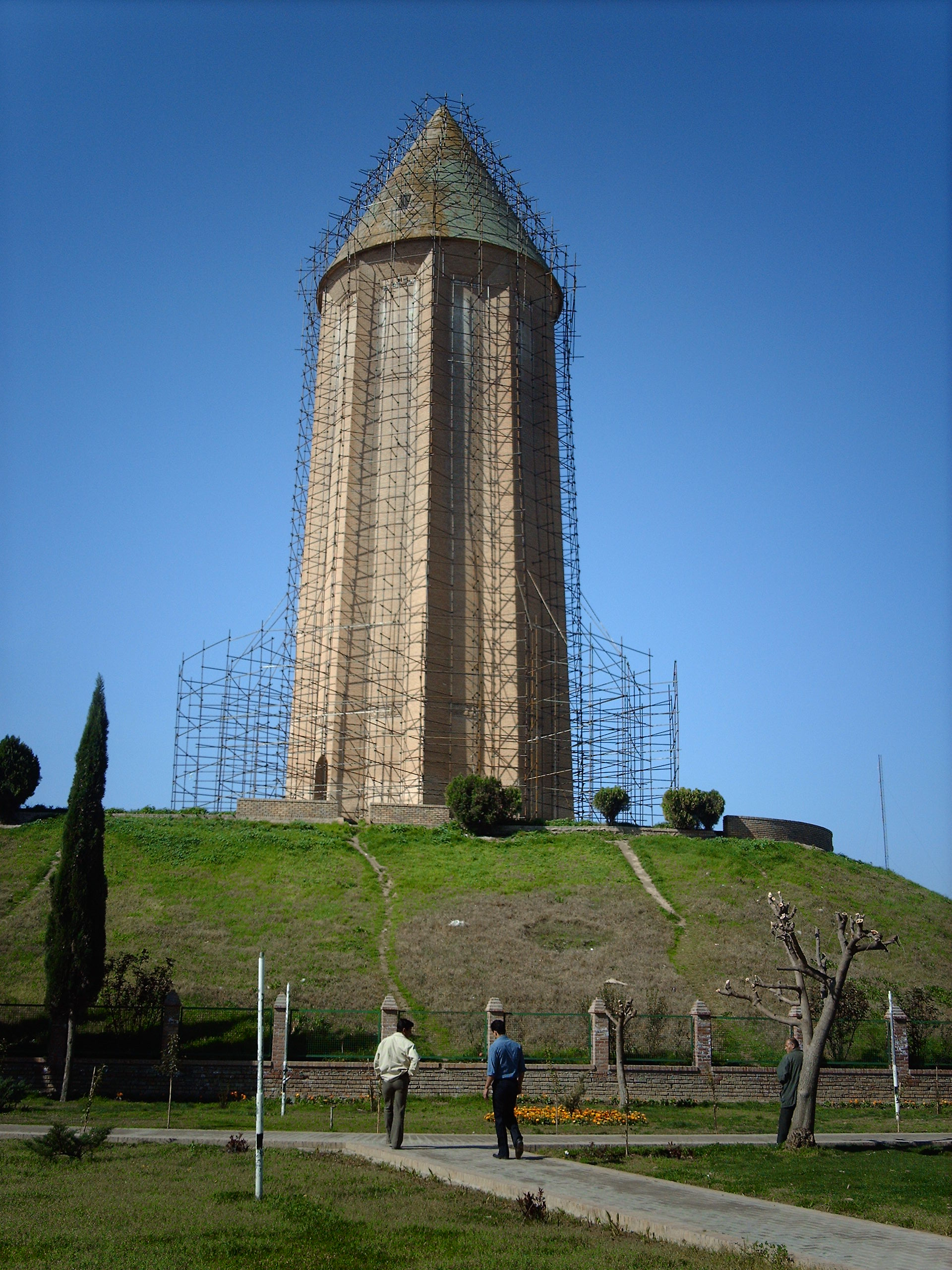 برج قابوس بن وشمگیر در شهر گنبد کاووس